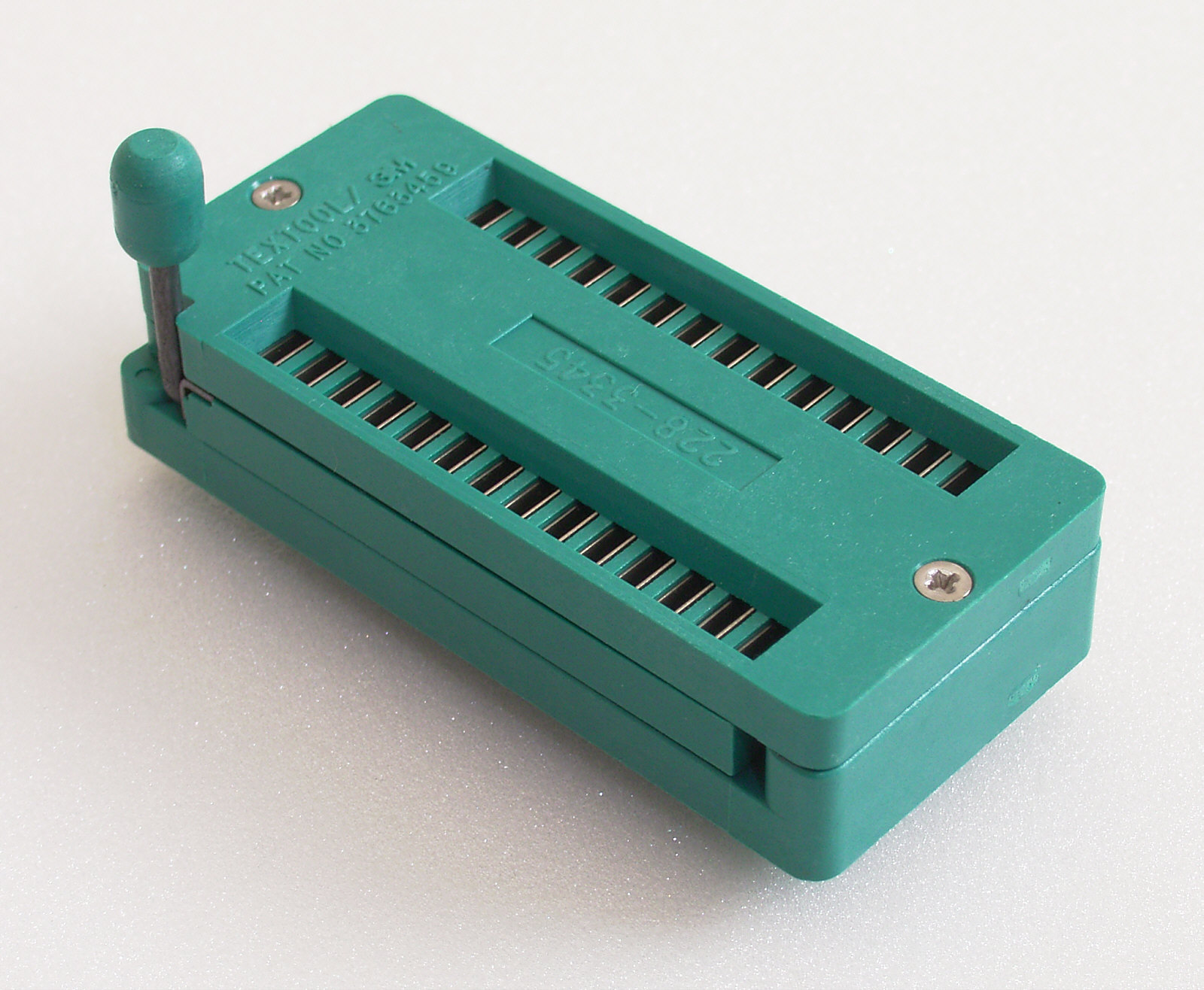 Textoolfassung